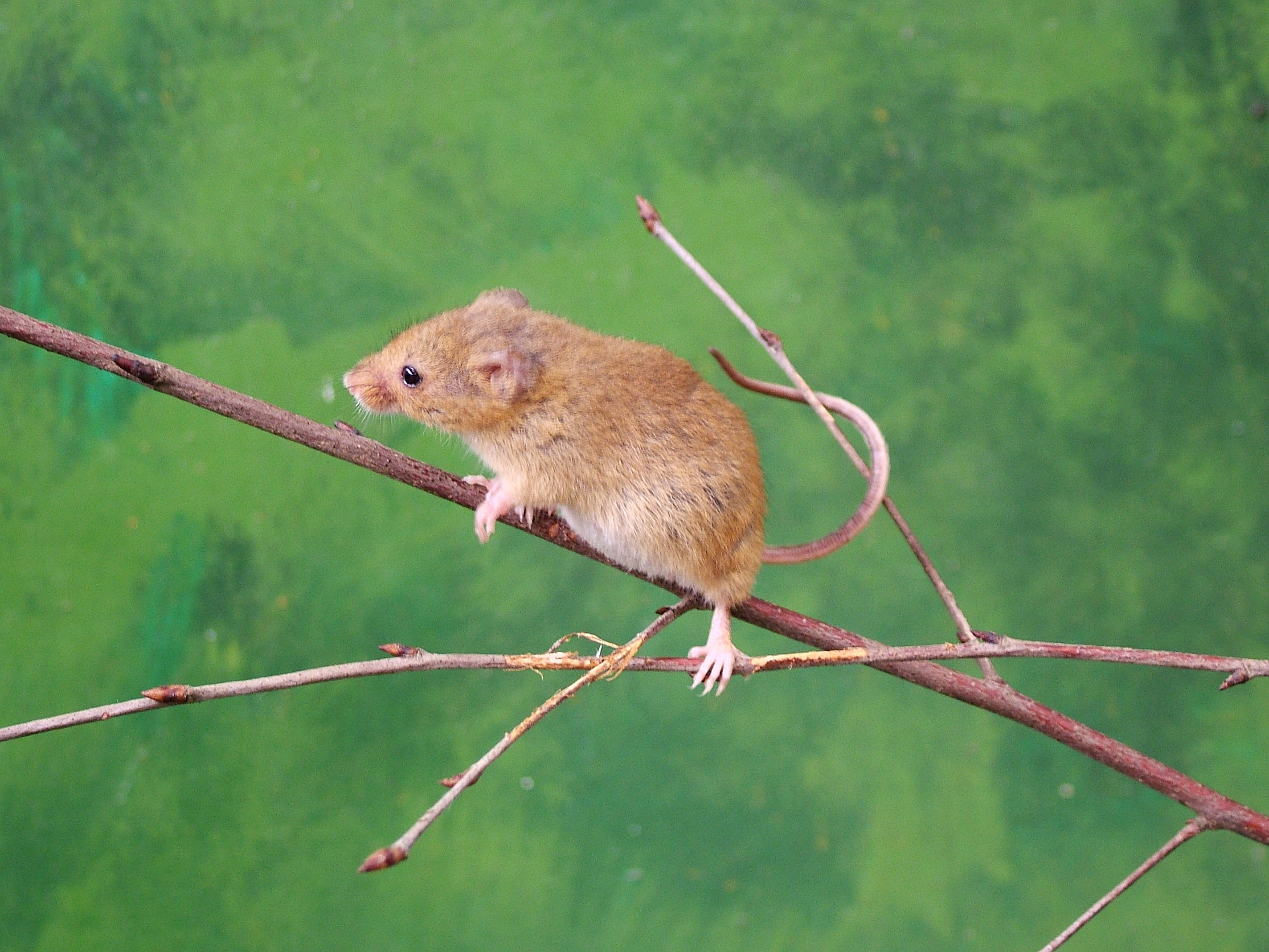 Harvest mouse badylarka Micromys minutus